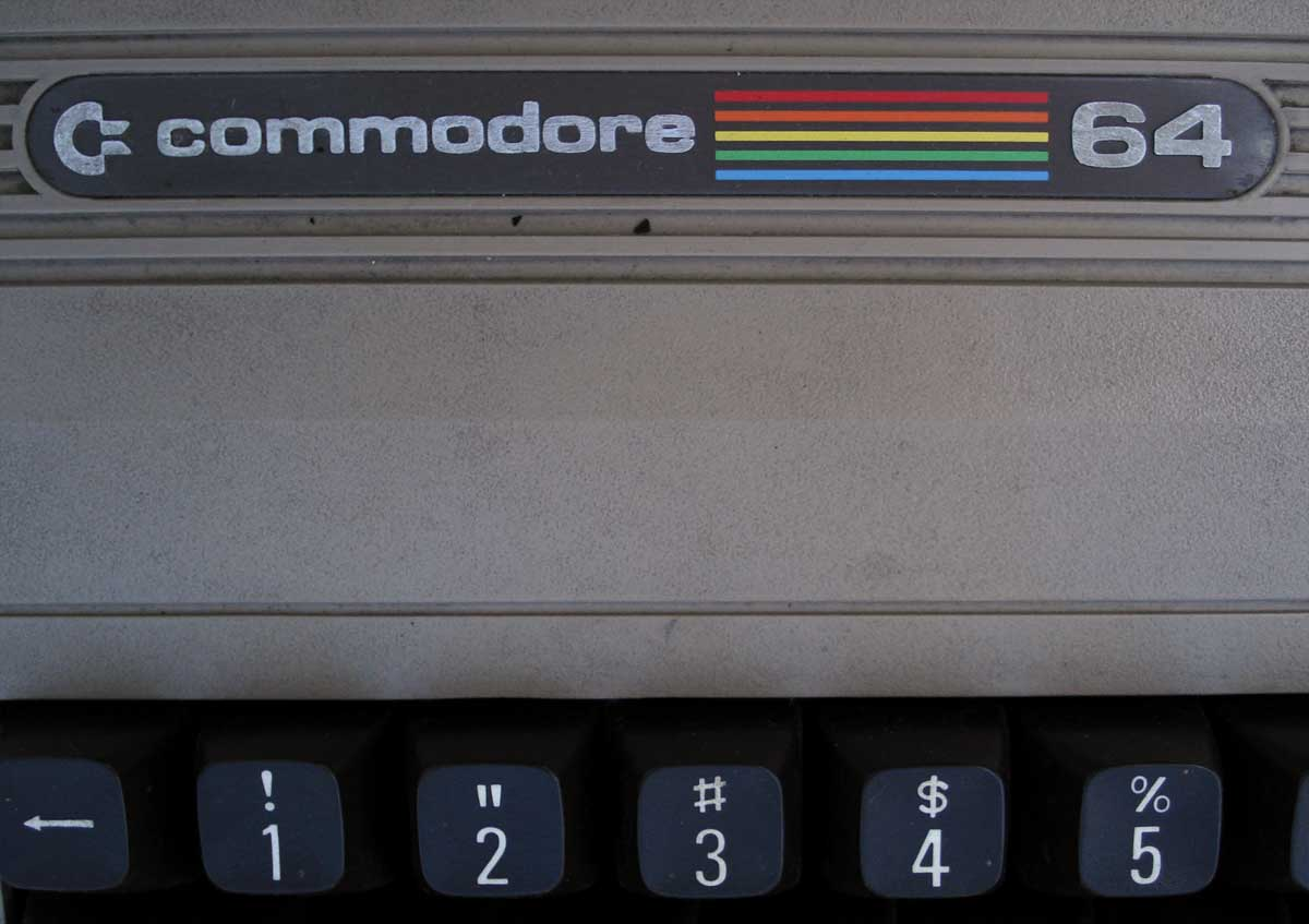 Commodore logo on a C64